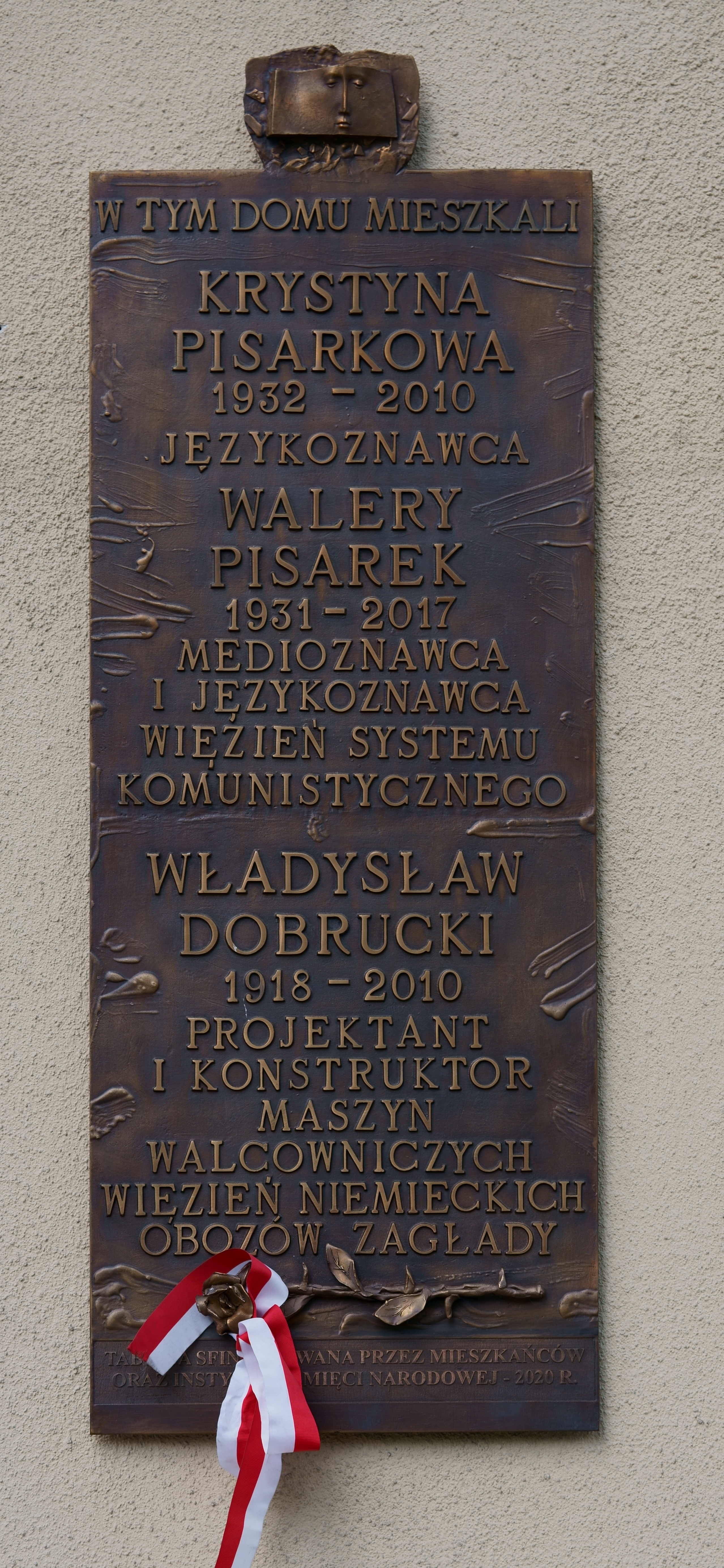 Tablica pamiątkowa na osiedlu Słoneczny w Krakowie odsłonięta w 2020 r. poświęcona Krystynie Pisarek, Waleremu Pisarek, Władysławowi Dobruckiemu.